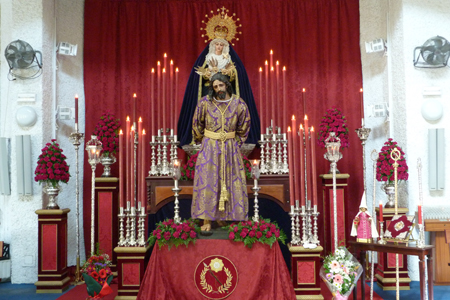 Altar de Tríduo